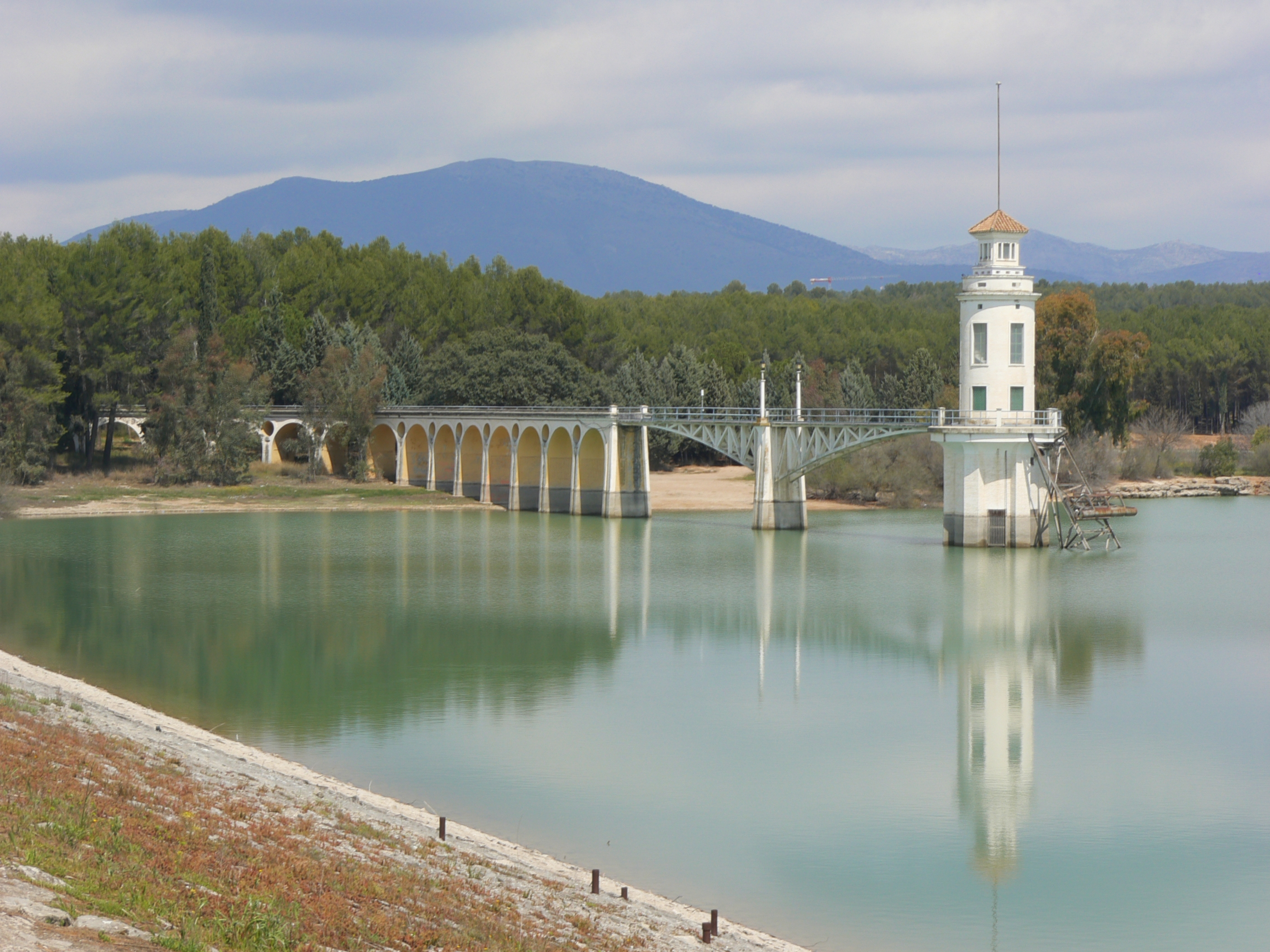 Torre del embalse del Cubillas, Granada, España.